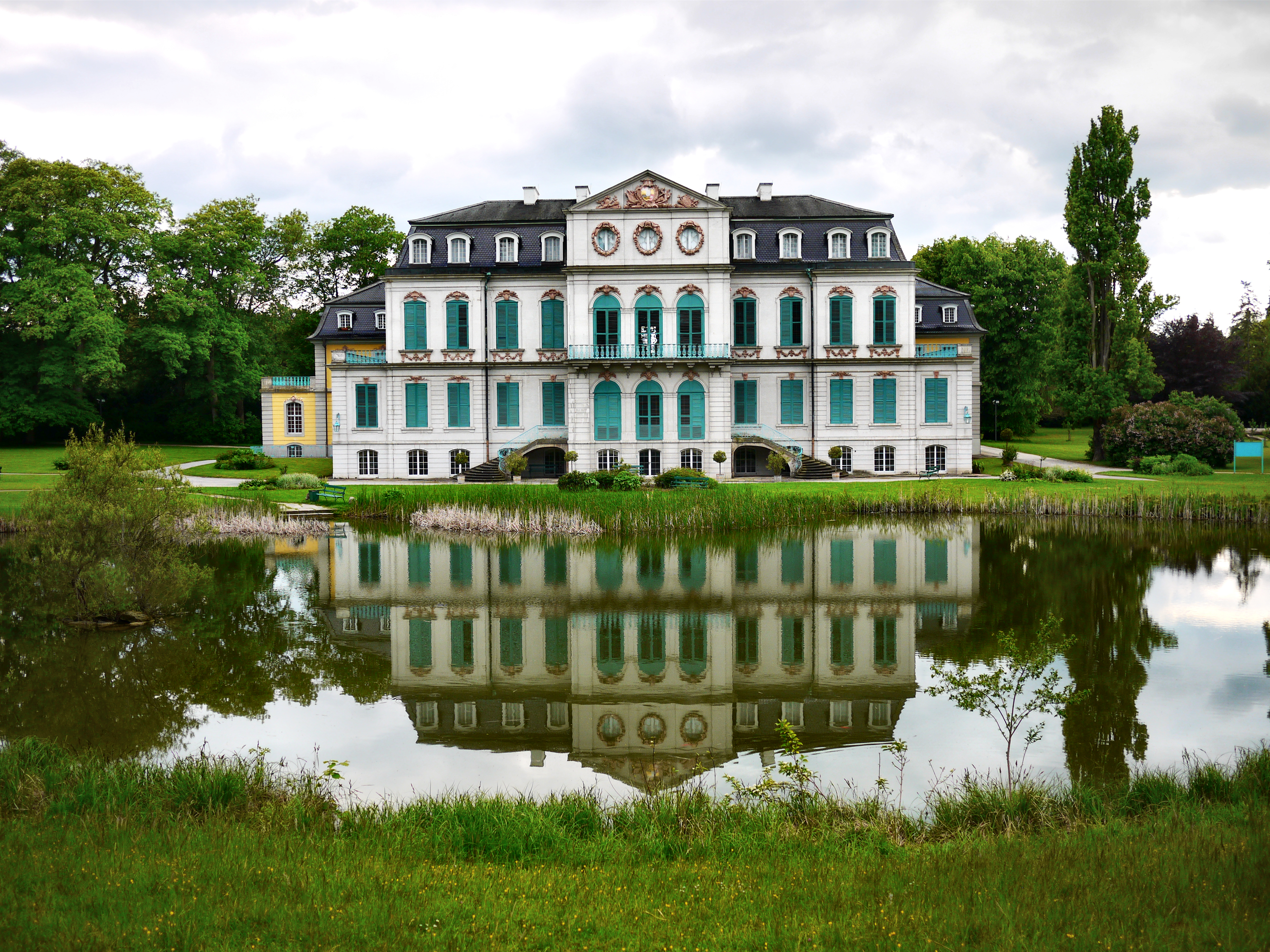 Rokoko Schloss Wilhemsthal - Sicht vom Schlosspark